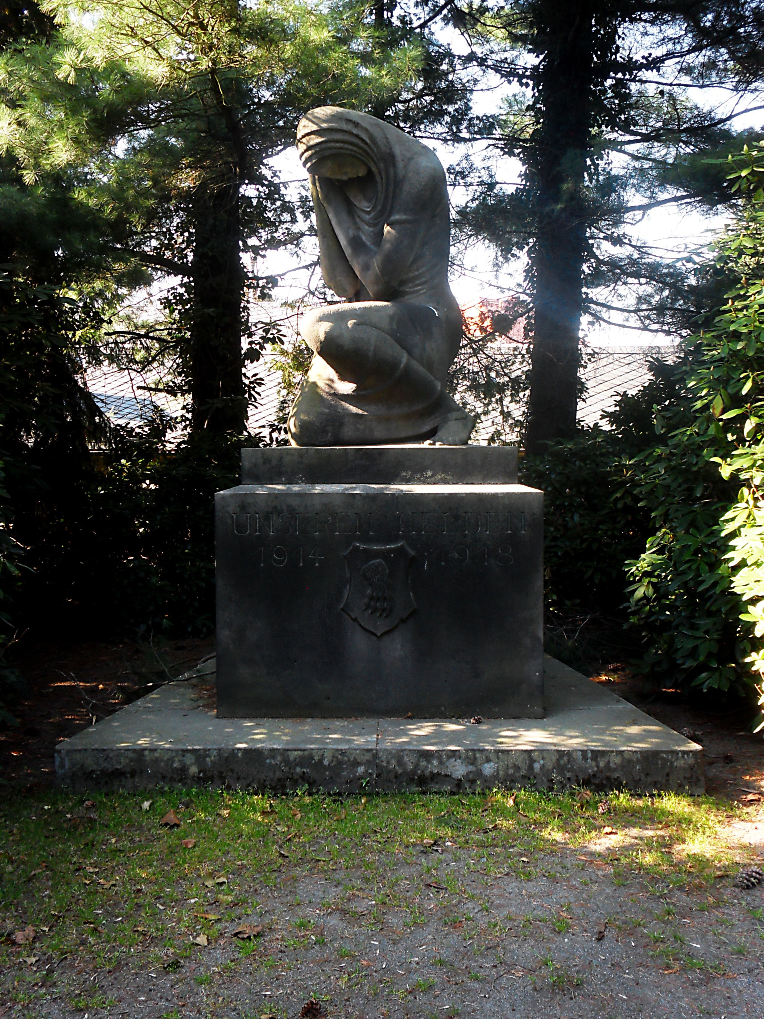 Ehrenmal für die Gefallenen des Ersten Weltkriegs auf dem Friedhof in Pulsnitz, Sachsen; Bildhauer: Johannes Ernst Born (Dresden)